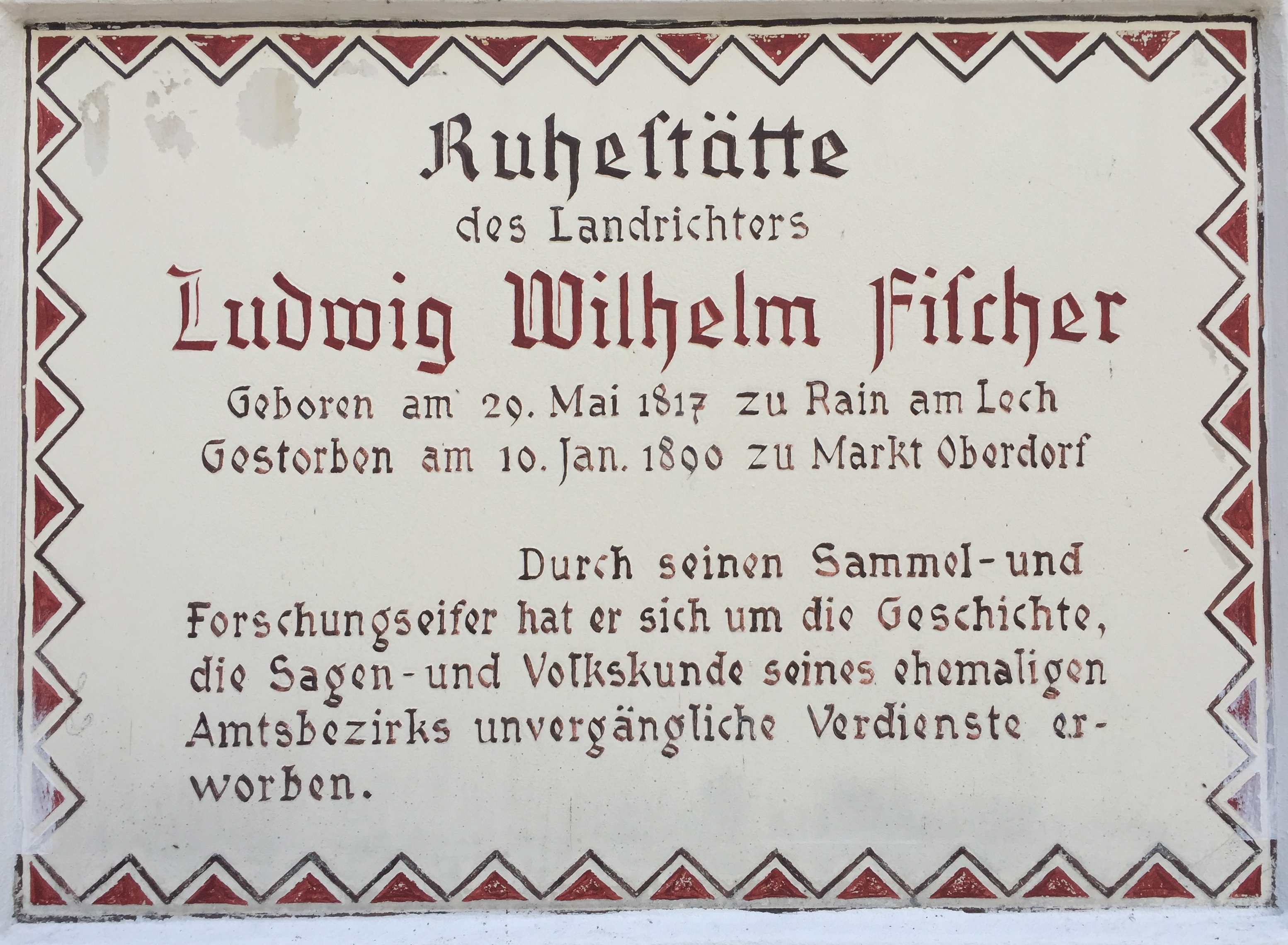 Gedenktafel für den Landrichter und Heimatforscher Ludwig Wilhelm Fischer an der Ostseite der Kirche St. Martin in Marktoberdorf